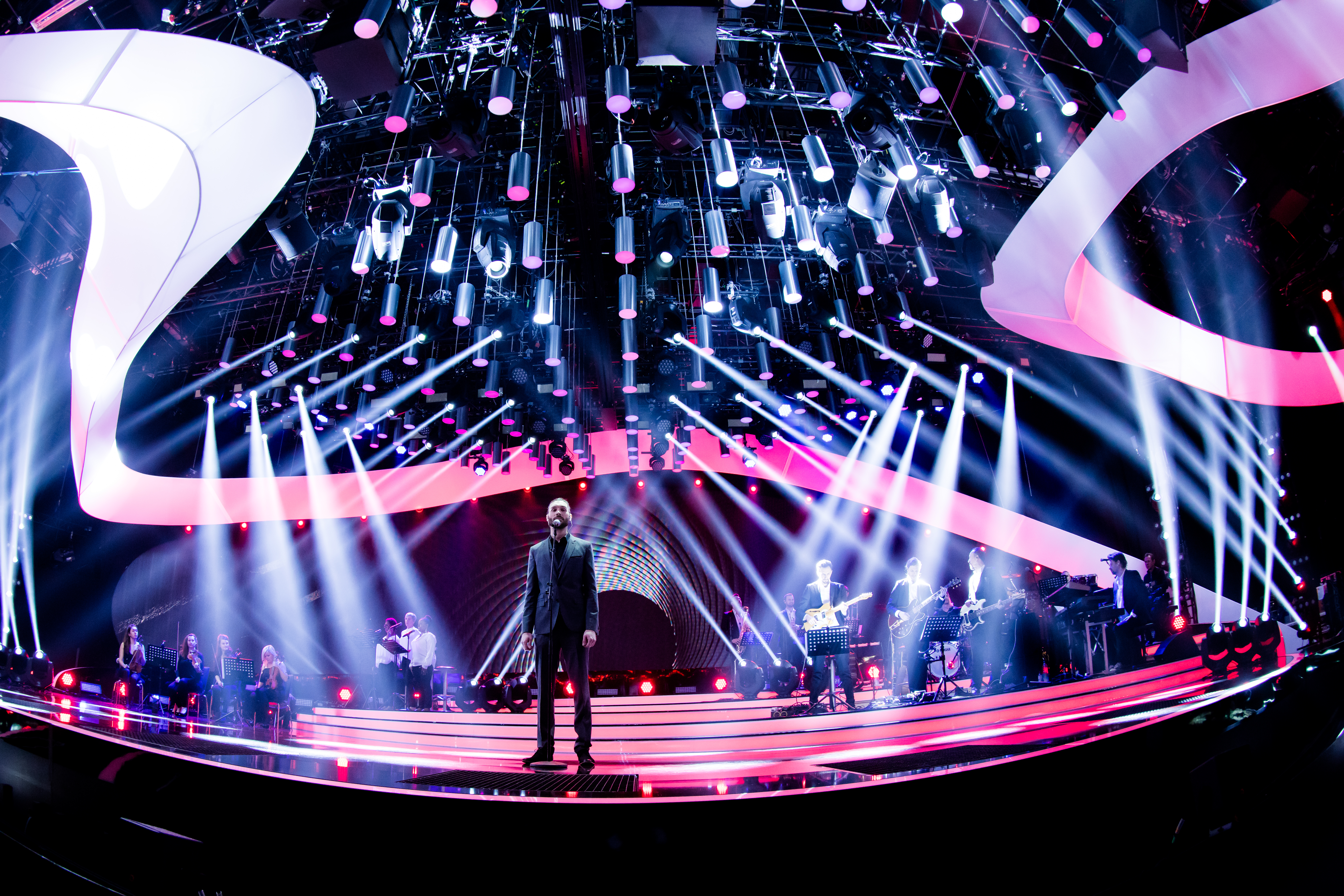 Unser Song 2017 (Probentag) für Eurovision Song Contest 2017 during Eurovision Song Contest - Unser Song 2017 at , Köln, Nordrhein-Westfalen, Germany on 2017-02-08, Photo: Sven Mandel